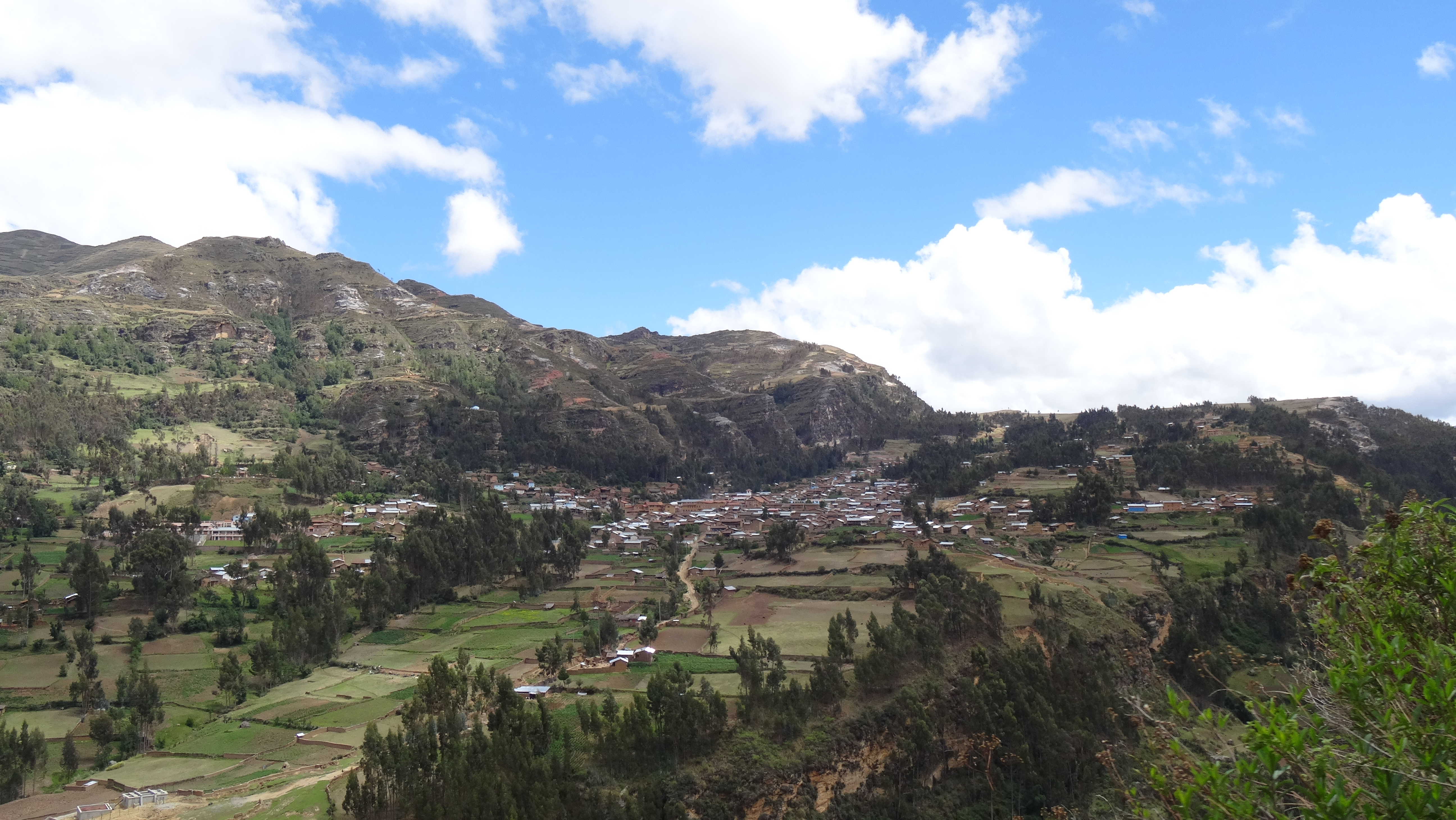 Punchao, el mediodía de Huánuco.